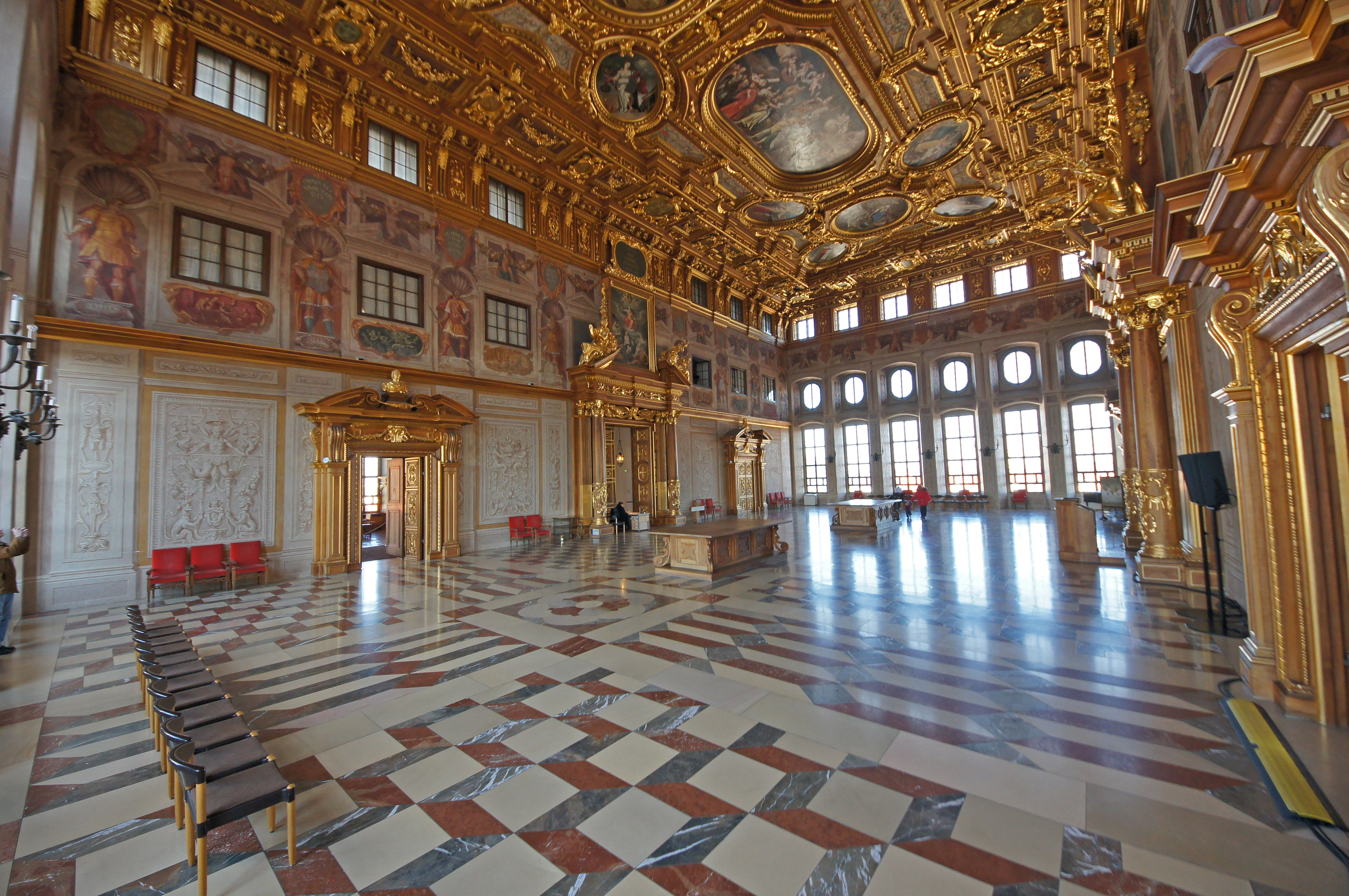 2011-02-26 Augsburg 011 Rathaus, Goldener Saal